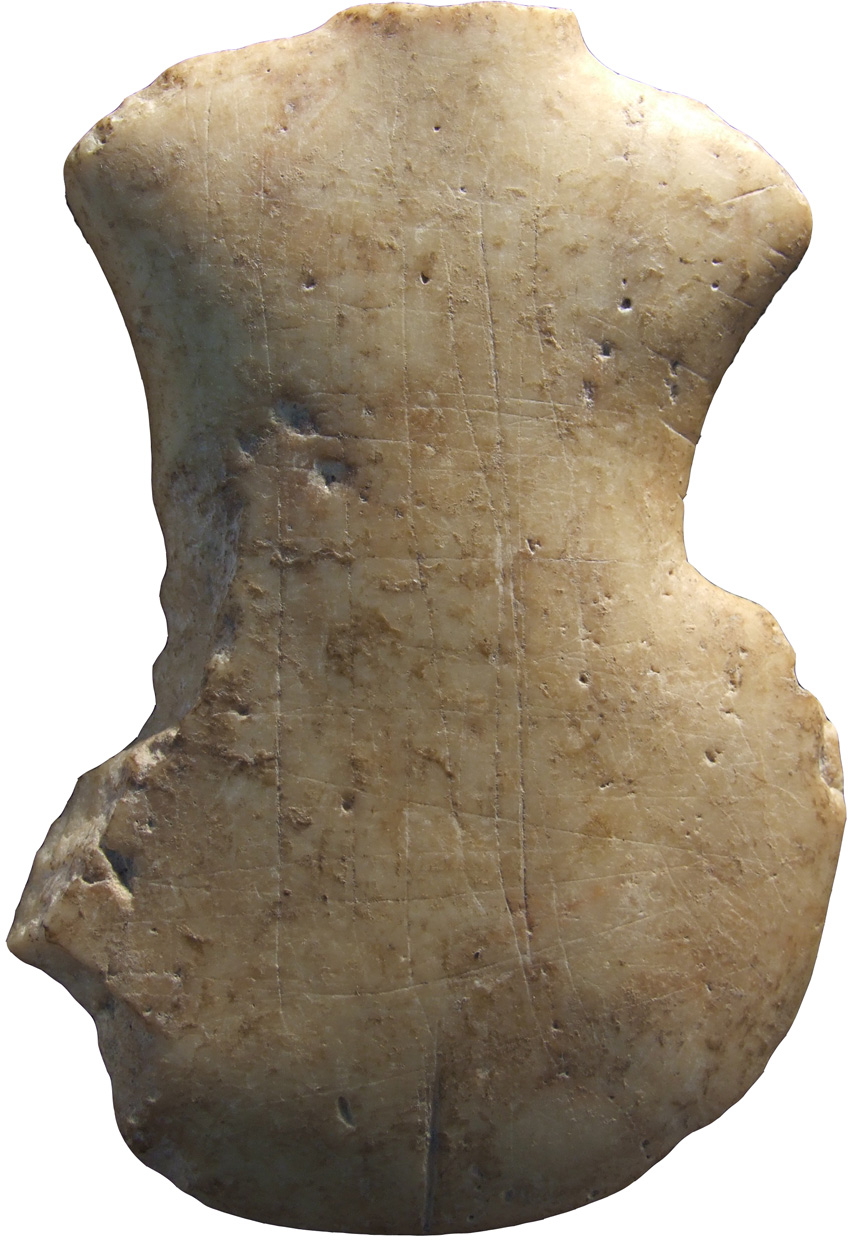 חורבת עוצה - "צלמית דמוית כינור" של אישה משכבה 16 התקופה הכלקוליתית